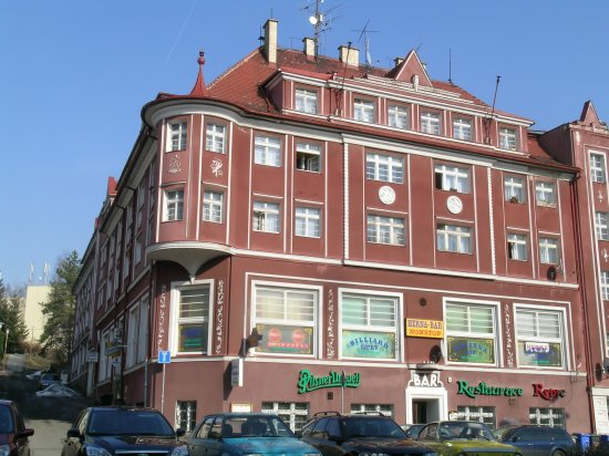 Městský dům - soubor domů čp. 781, 782, 783 a 464 (Liberec), Hroznová 781/2, Liberec